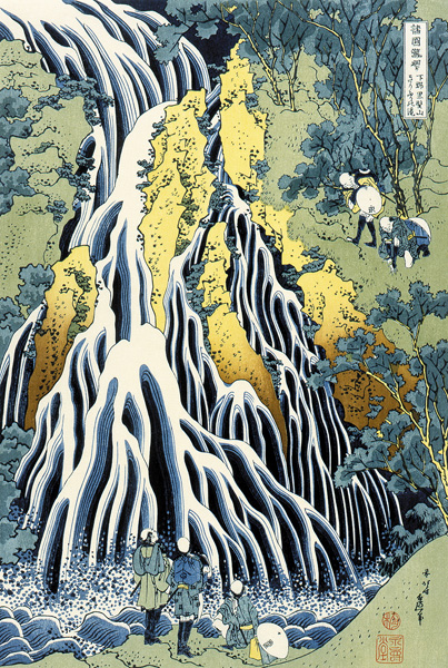 下野黒髪山きりふりの滝（しもつけくろかみやまきりふるのたき）